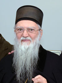 Његово Високопреосвештенство Митрополит загребачко-љубљански Г. Г. Јован, део фотографије